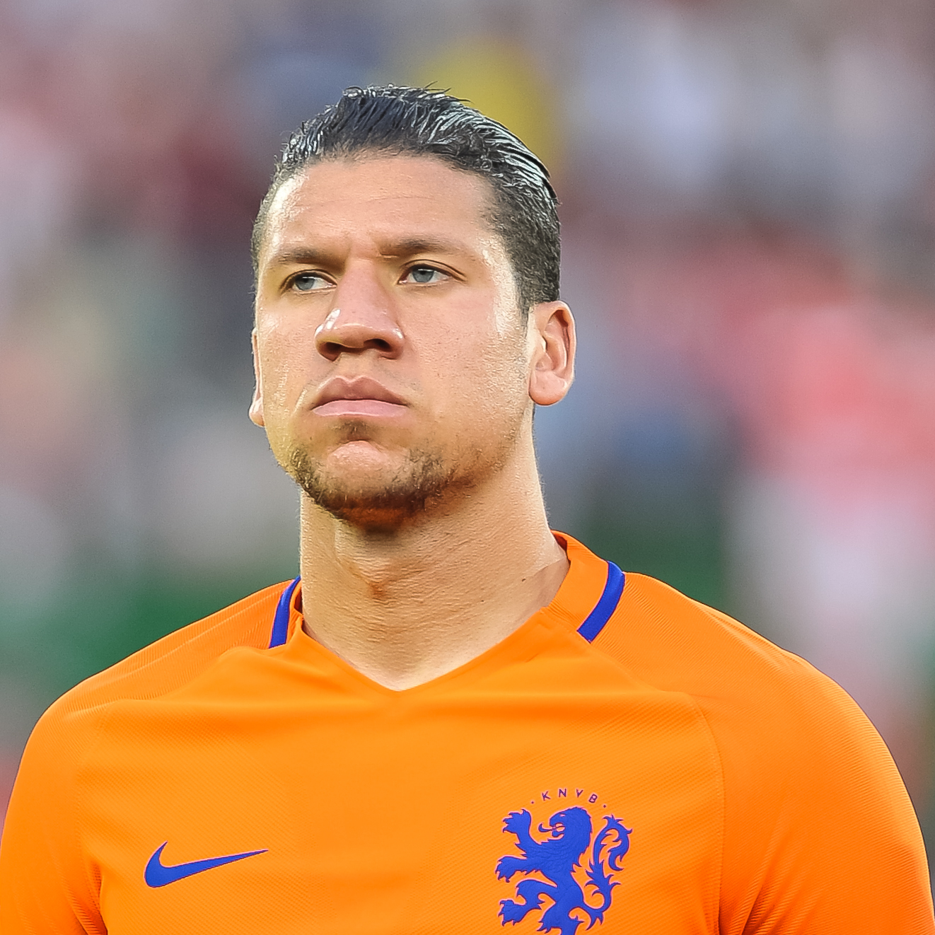 Wien, 4.6.2016, ÖFB Laenderspiel - Österreich vs Niederlande. Bild zeigt Jeffrey Bruma (NED).